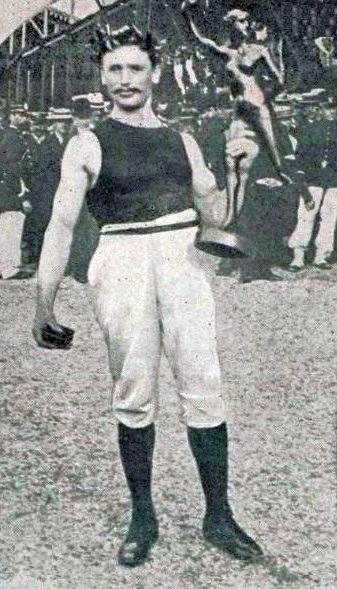 Gustave Sandras, champion olympique du concours général de gymnastique en 1900